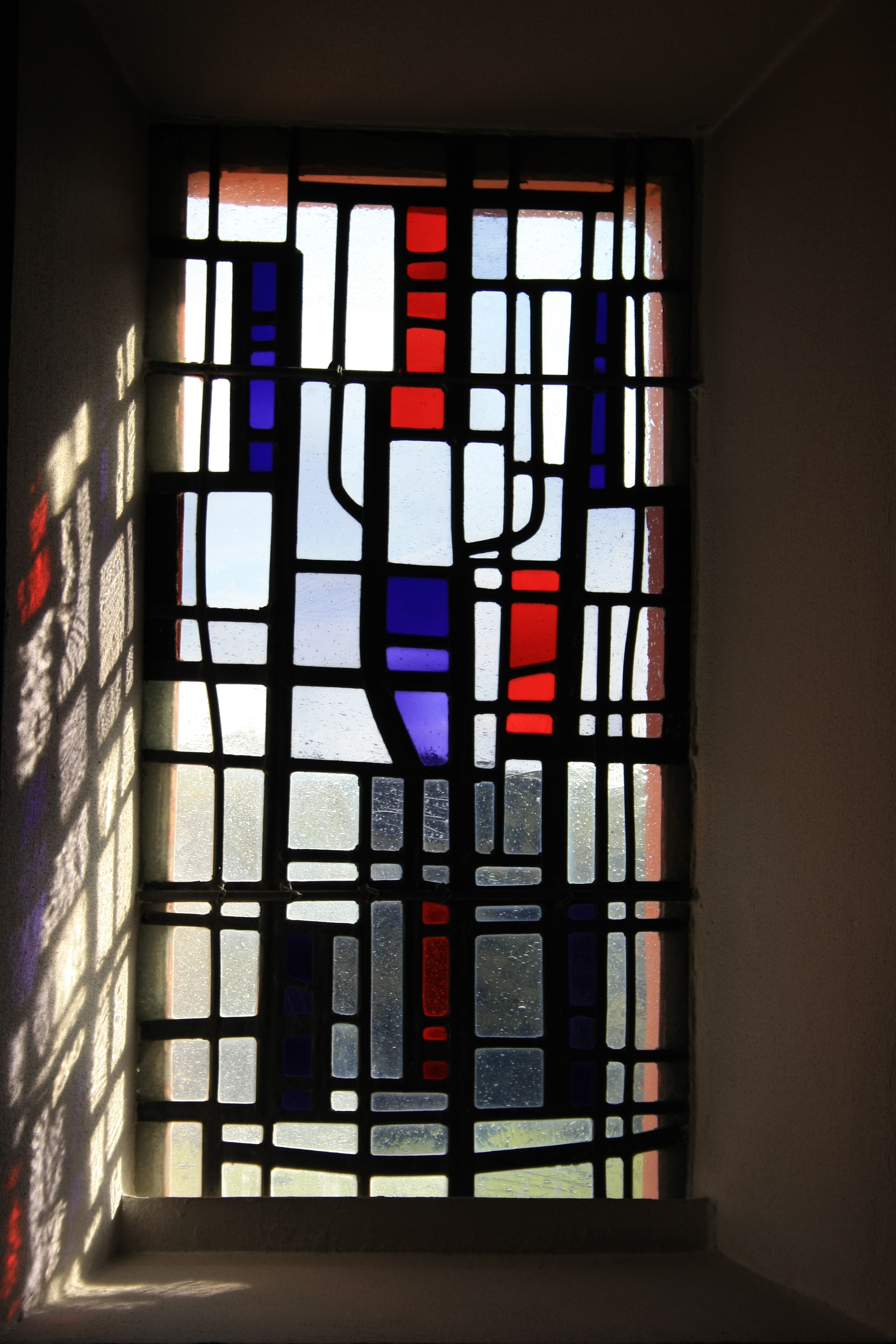 Abstraktes Bleiglasfenster in der katholischen Pfarrkirche St. Sebastianus in Dorsel